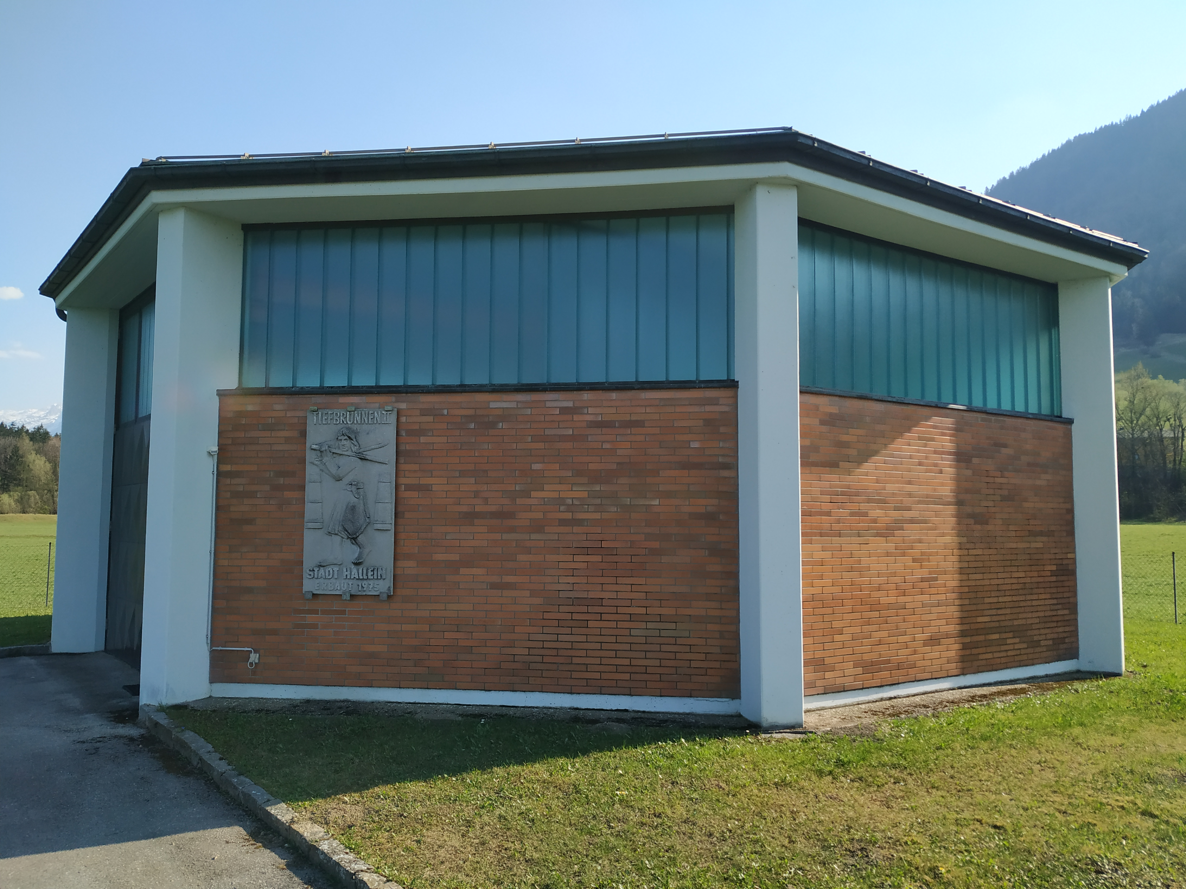 Brunnenhaus eines Tiefbrunnens in Hallein Gamp